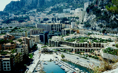 Author: Radovan Bahna, Slovak Republic Monaco, 1995